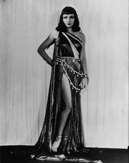 Claudette Colbert, en impératrice romaine vers 1925